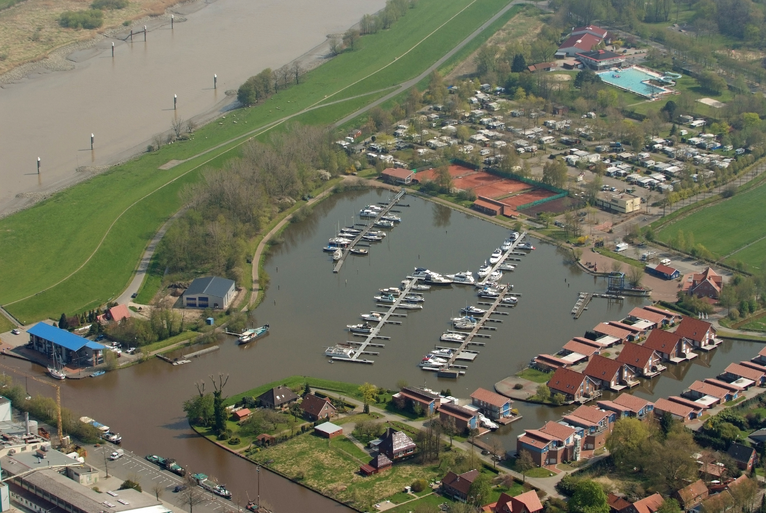 Alter Hafen (jetzt Sportboothafen) von Weener